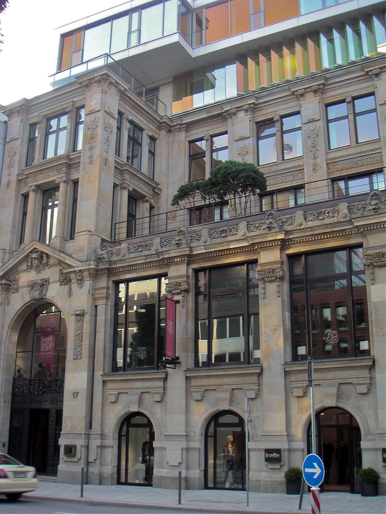 Hamburg, Kontorhaus Hohe Bleichen 17, Altstadt